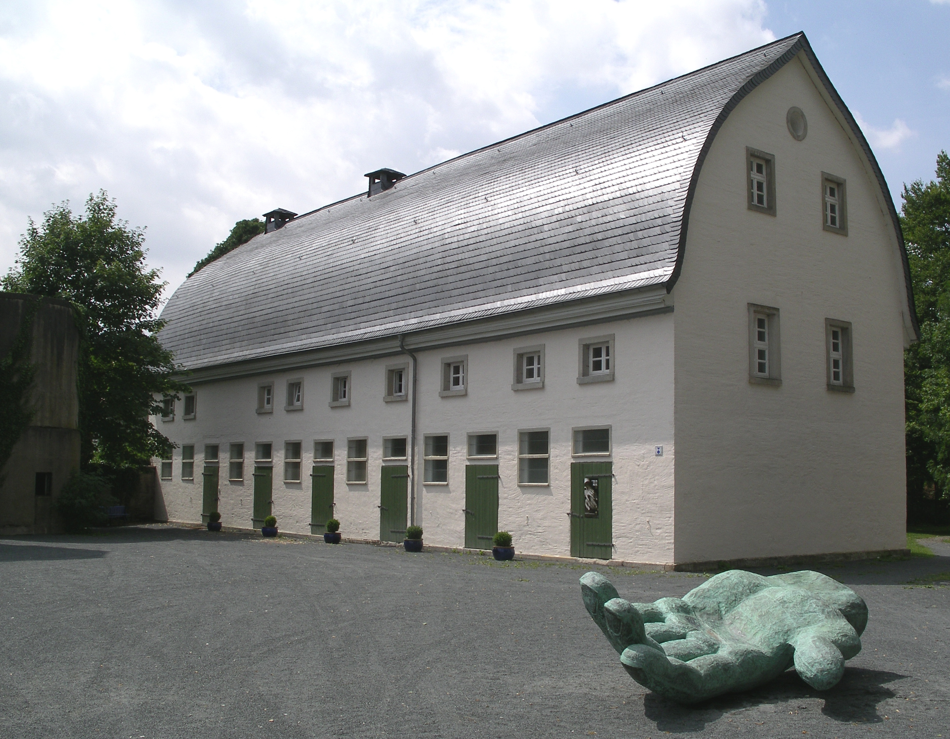 Außenansicht Kunstgebäude Schloss Bodenburg